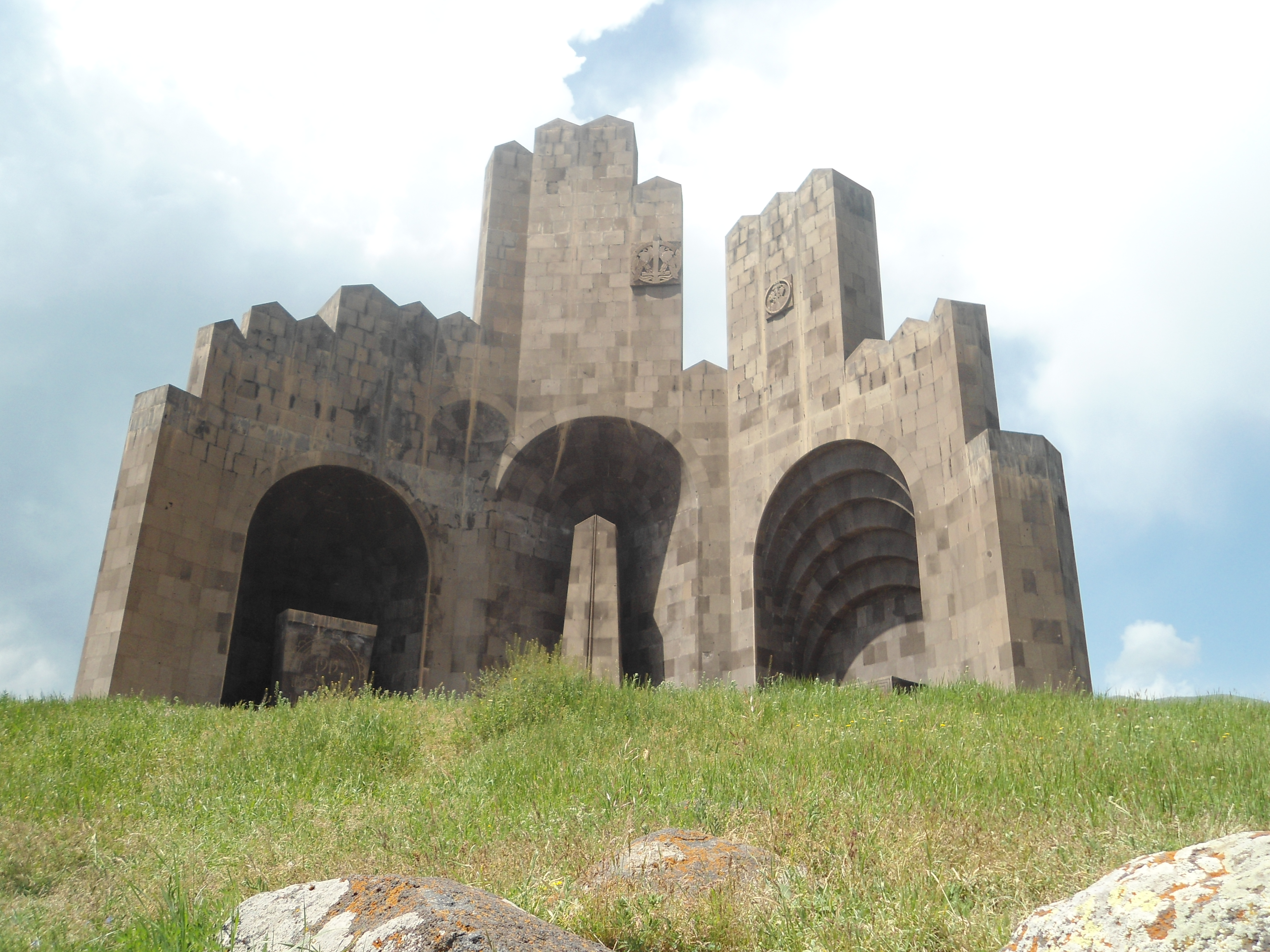 Ապարանի